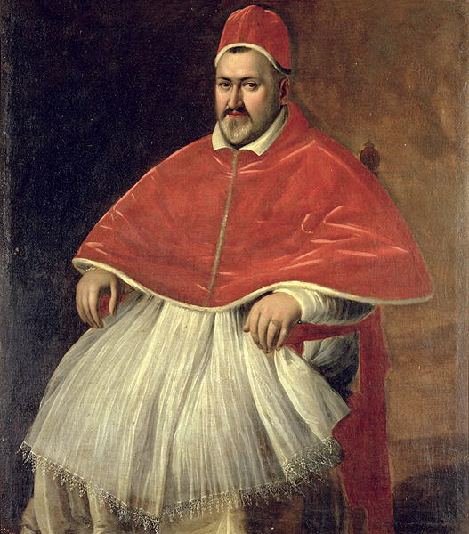 Latin: Papa Paulus V